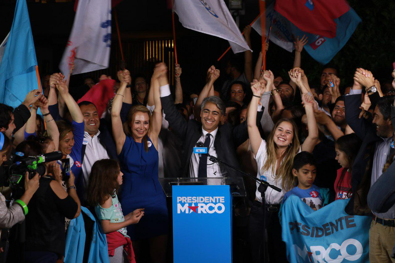 Cierre de la campaña presidencial del añor 2017 del candidato chileno Marco Enríquez-Ominami.